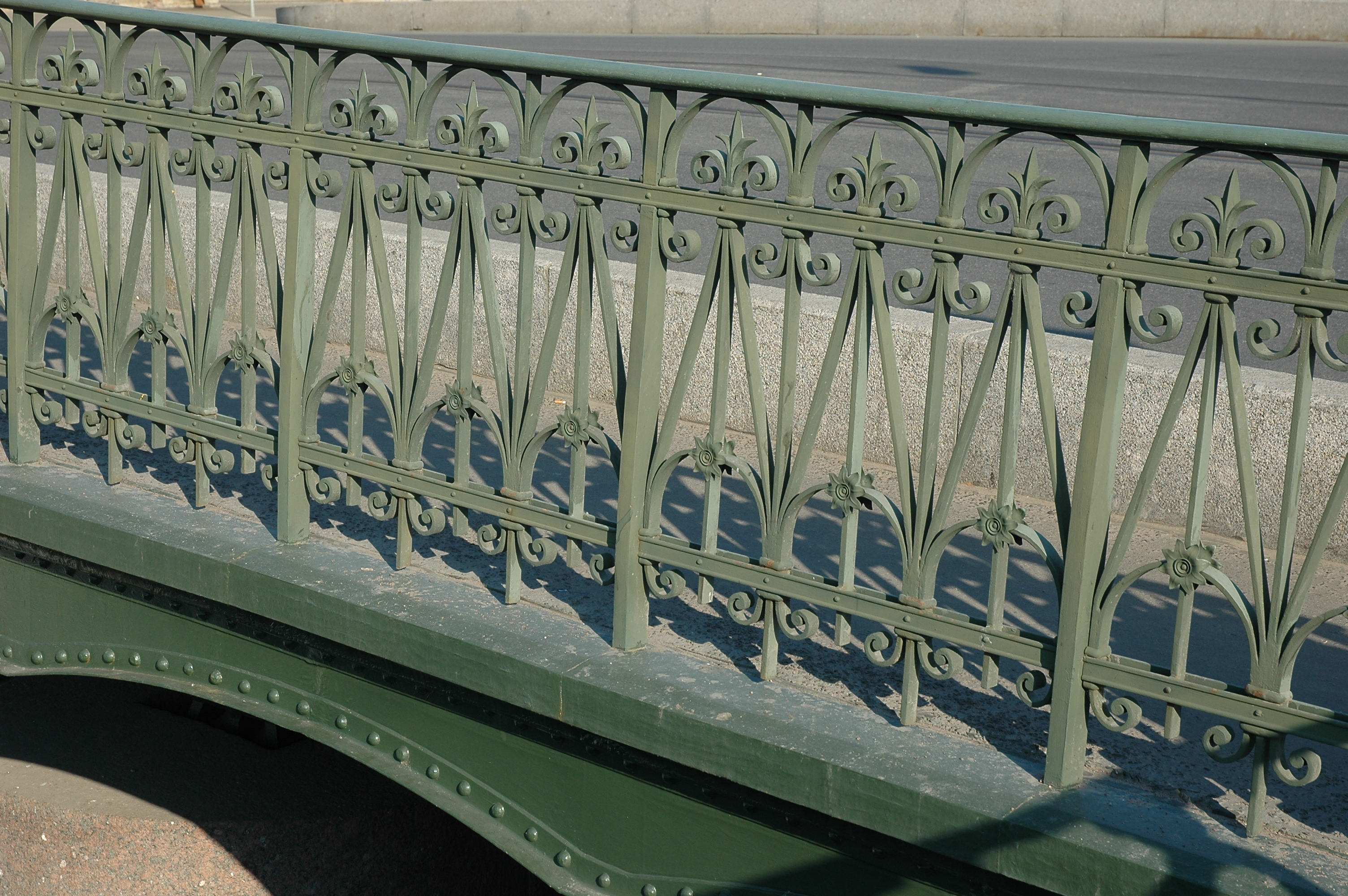 Staro-Nikolskii bridge across Kriukov canal (St Petersburg), fence